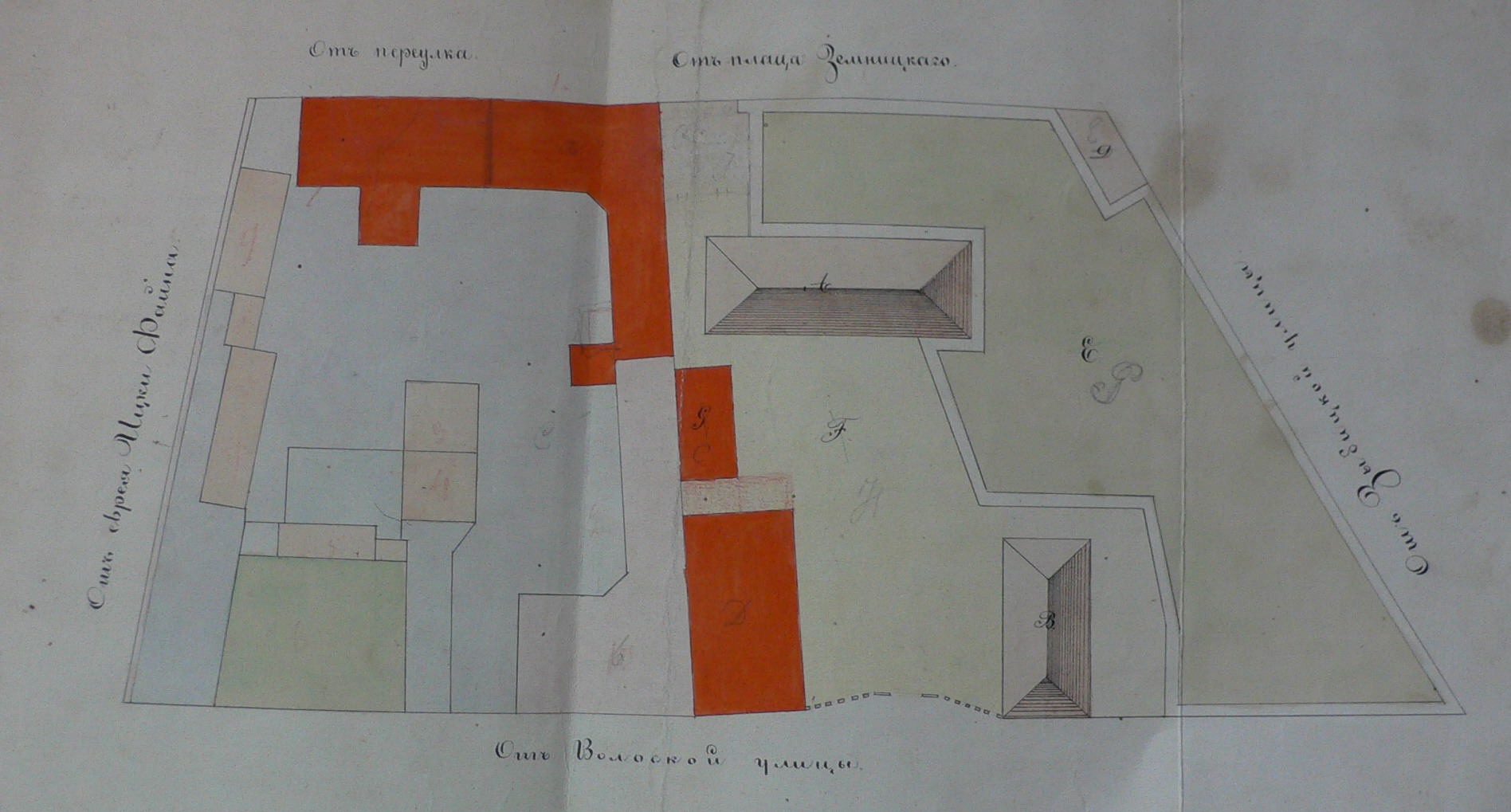 Беларуская (тарашкевіца): Менск (Miensk), вуліца Валоцкая (vulica Vałockaja). Сядзіба Ваньковічаў (Vańkovič). Плян